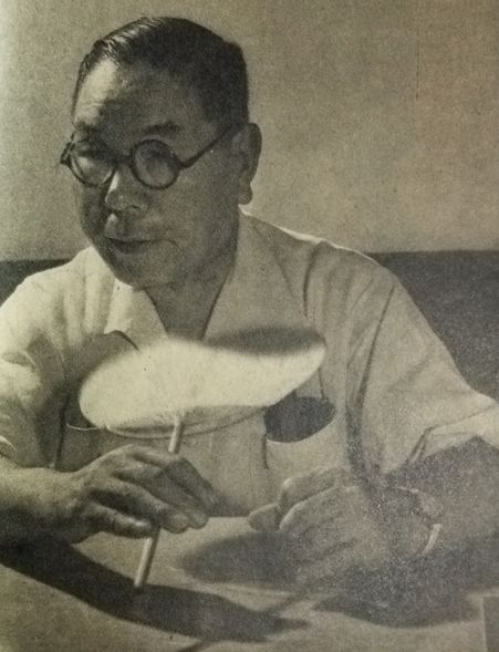 福留繁